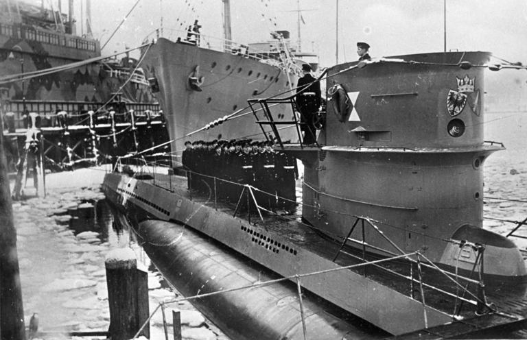 Kiel, Indienststellung U-Boot U 203 Indienststellung eines Unterseeboots, Krupp-Germaniawerft Kiel [Kiel.- Friedrich Krupp Germaniawerft, Indienststellung von U-Boot "U 203" mit Wappen der Stadt Essen, Typ VII C]